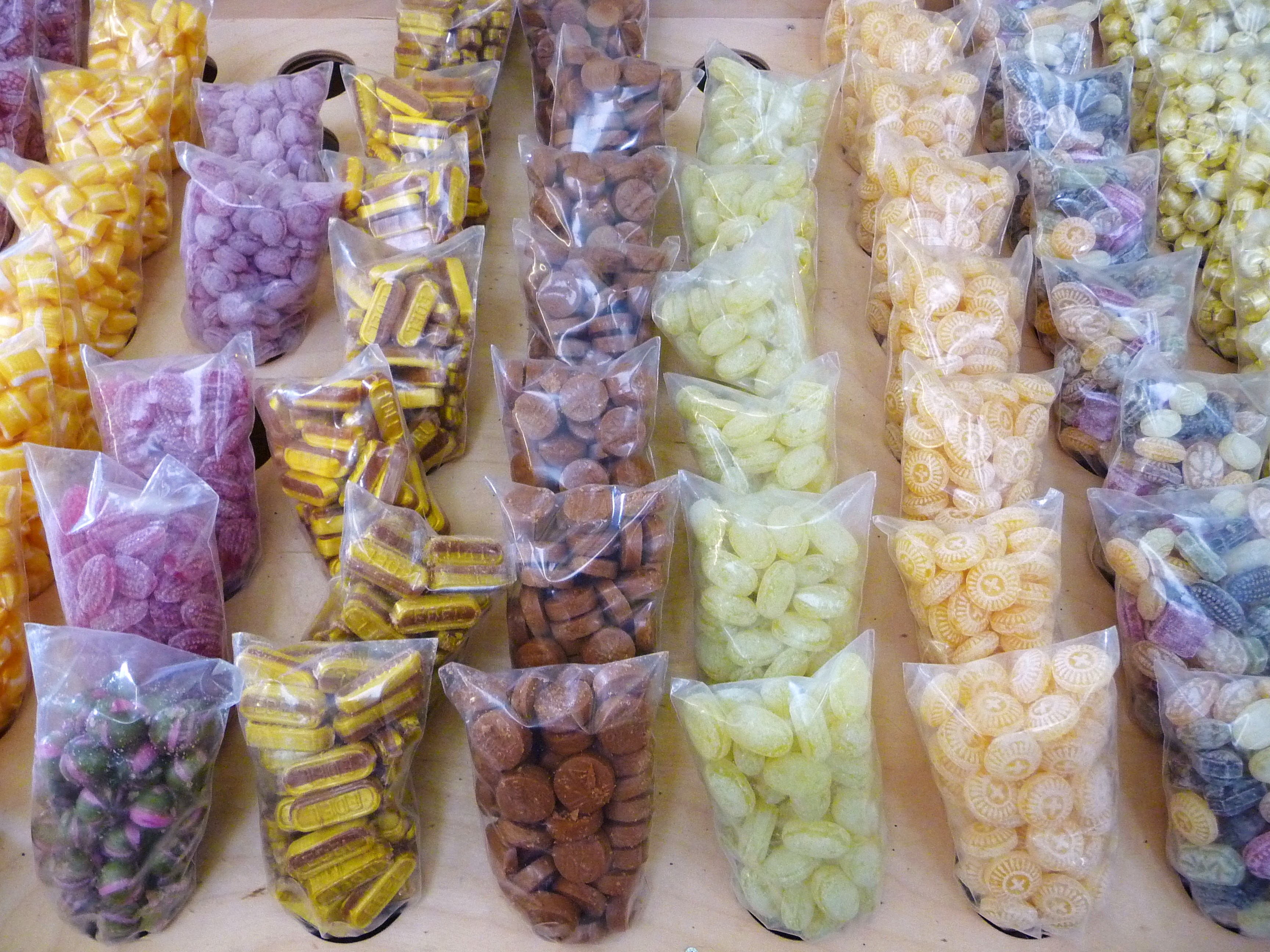 Verschiedene Bonbons nach traditioneller Rezeptur